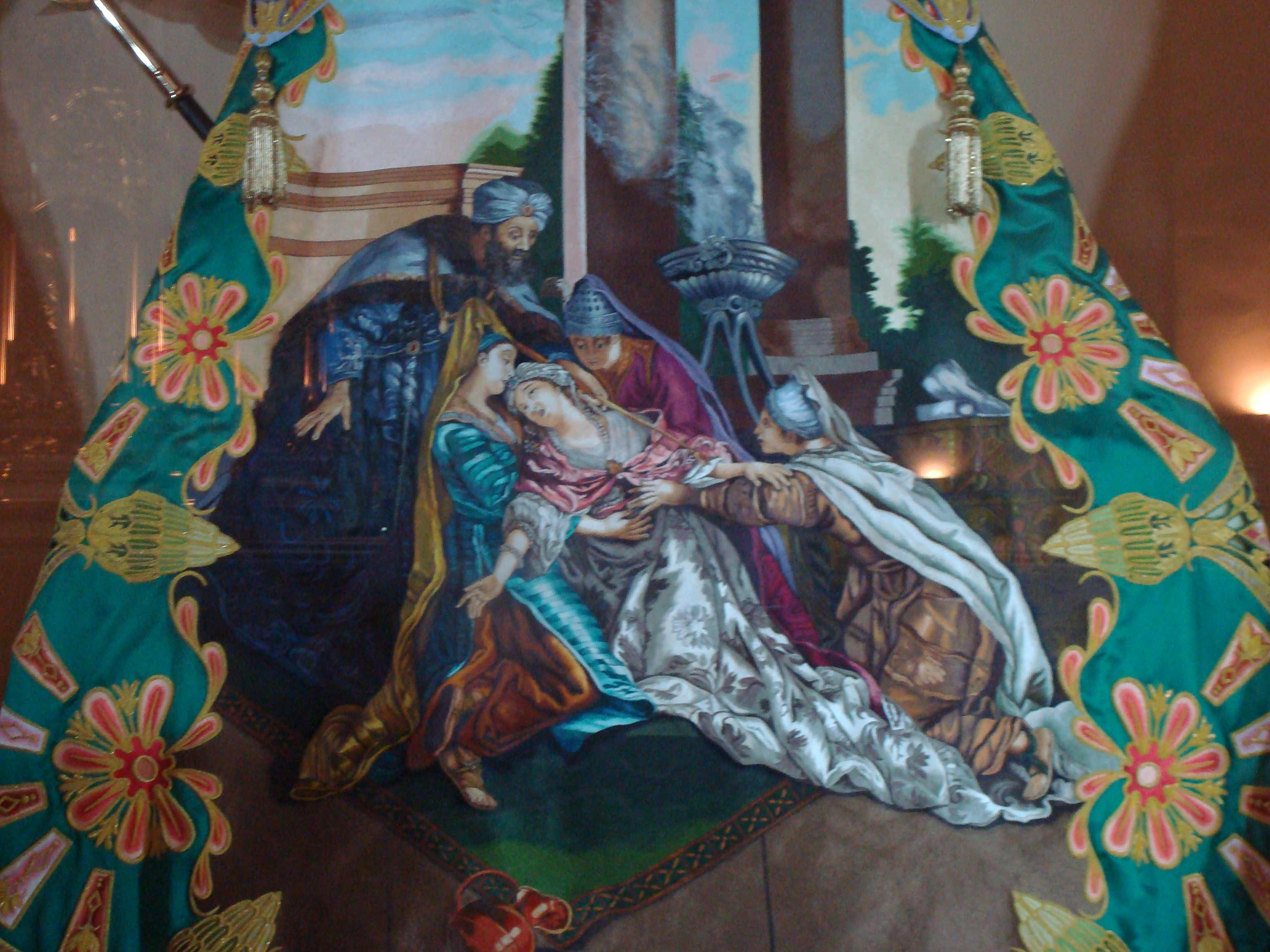 Manto de Esther, Semana Santa de Lorca